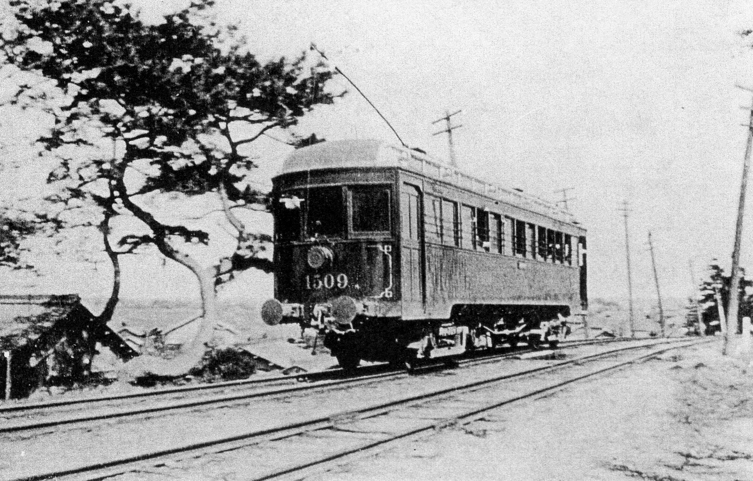 枇杷島付近を行く郊外電車（大正十年頃）